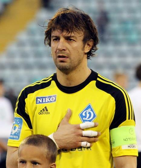 Олександр Шовковський - український футболіст під час виступів за Динамо на фіналі Кубку України